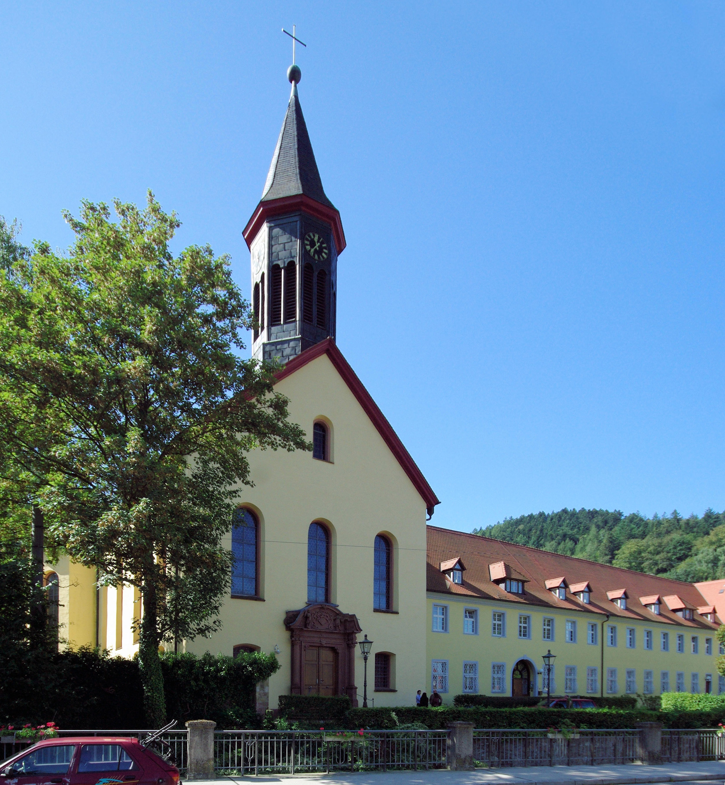 Liebfrauenkirche